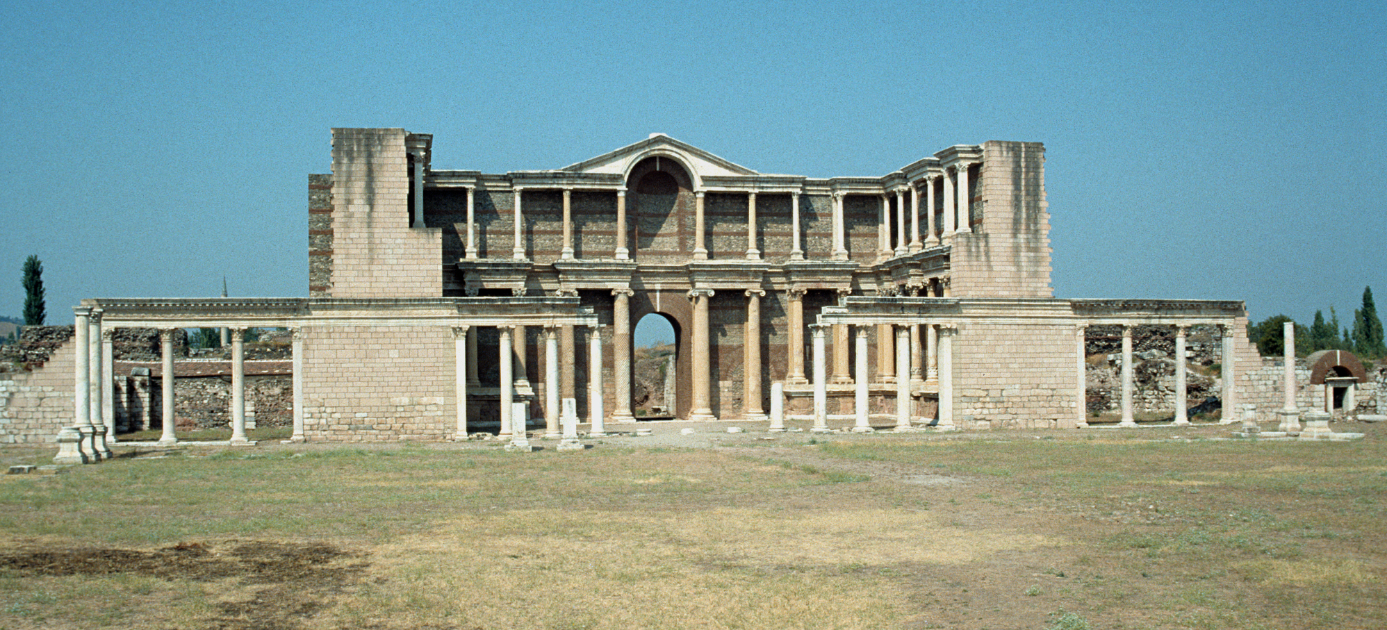 Gymnasium in Sardes,. Türkei